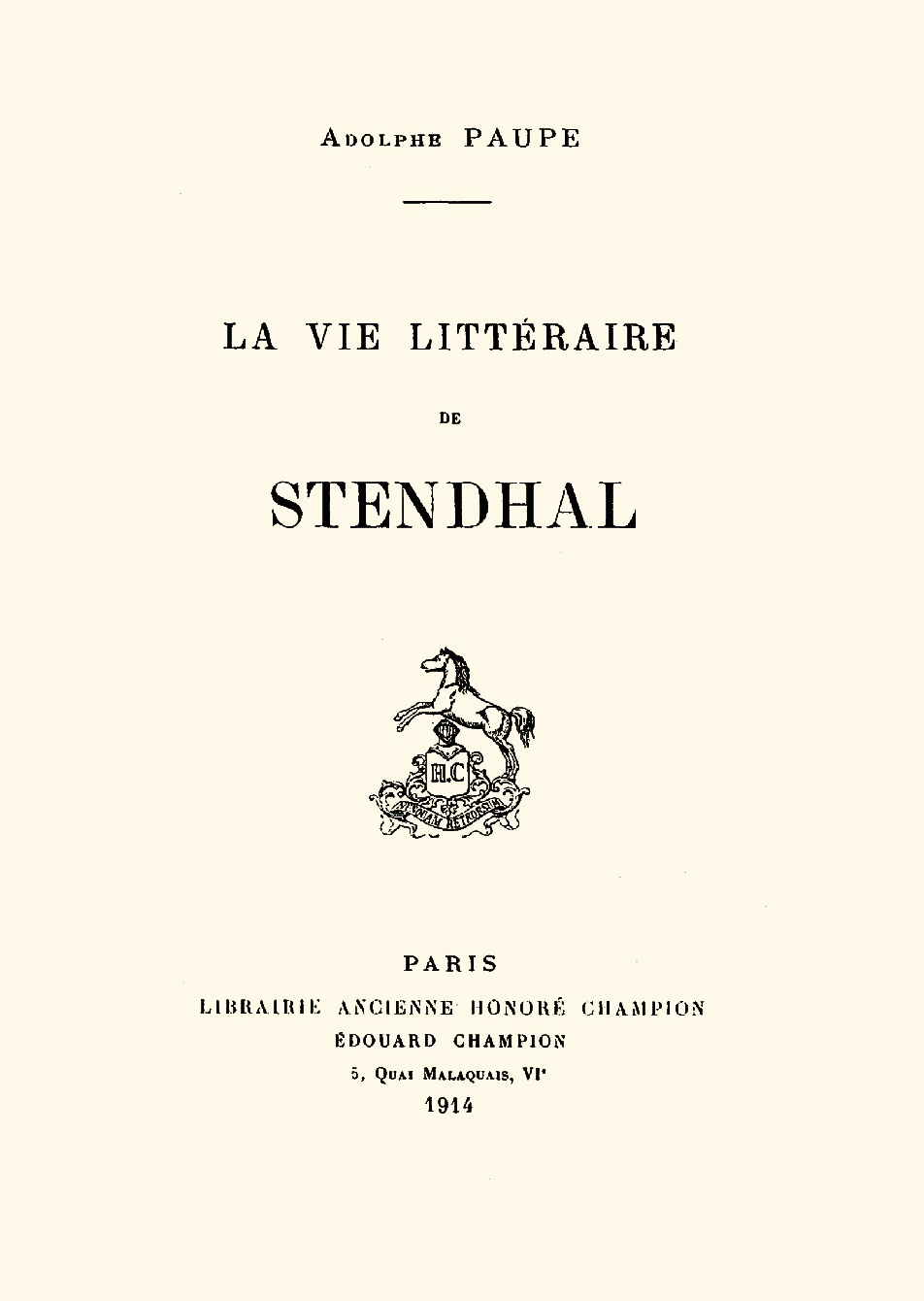 La vie littéraire de Stendhal, Adolphe Paupe, Librairie Édouard Champion, 1914.